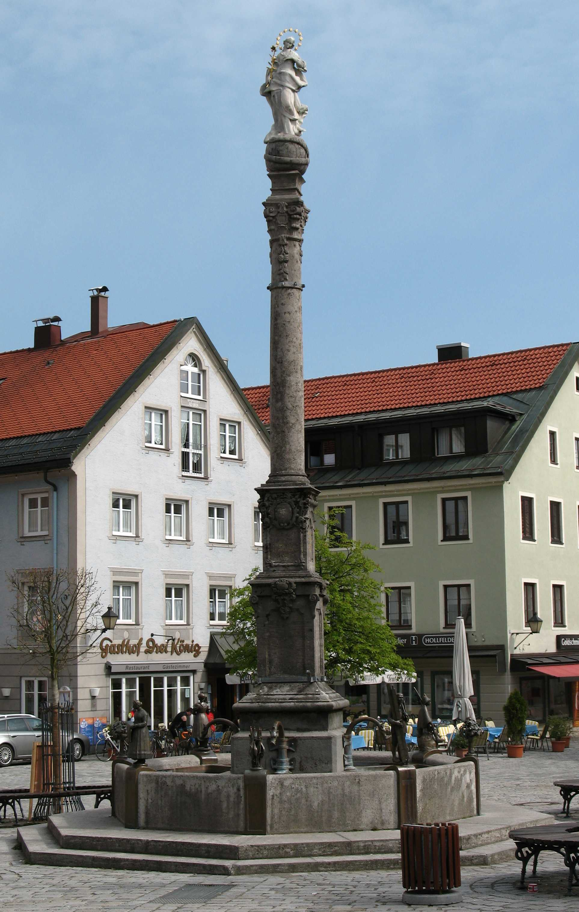 Mariensäule